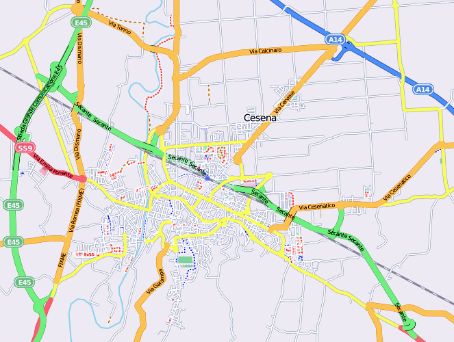 La mappa della Secante (Verde) presa da OpenStreetMap